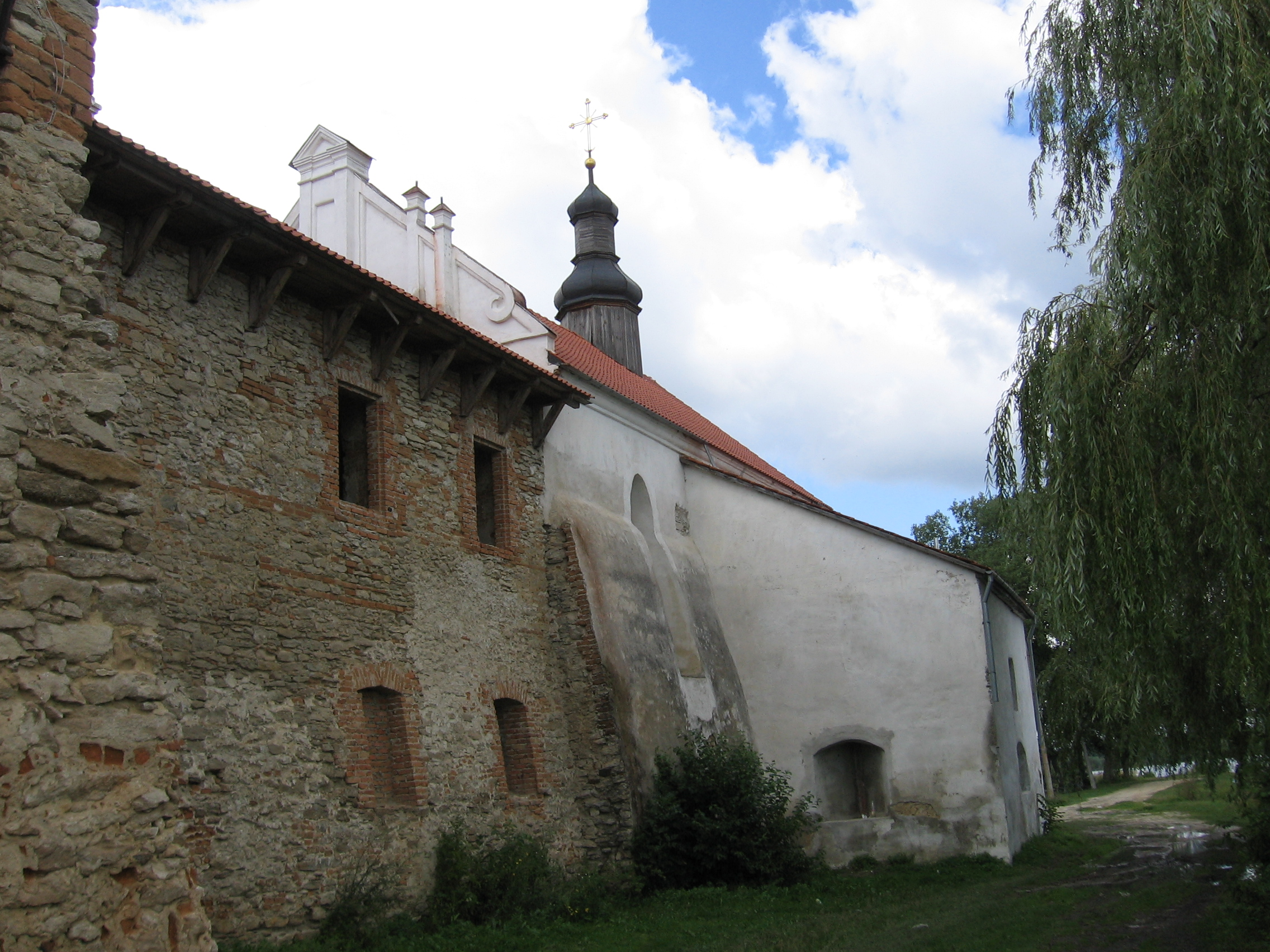 Троїцька церква Старокостянтинівського замку.